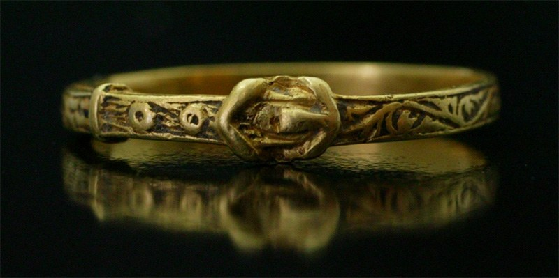 Anneau pour l'union de deux personnes aux Moyen_Age